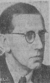 Arkitekten Herman Norgren